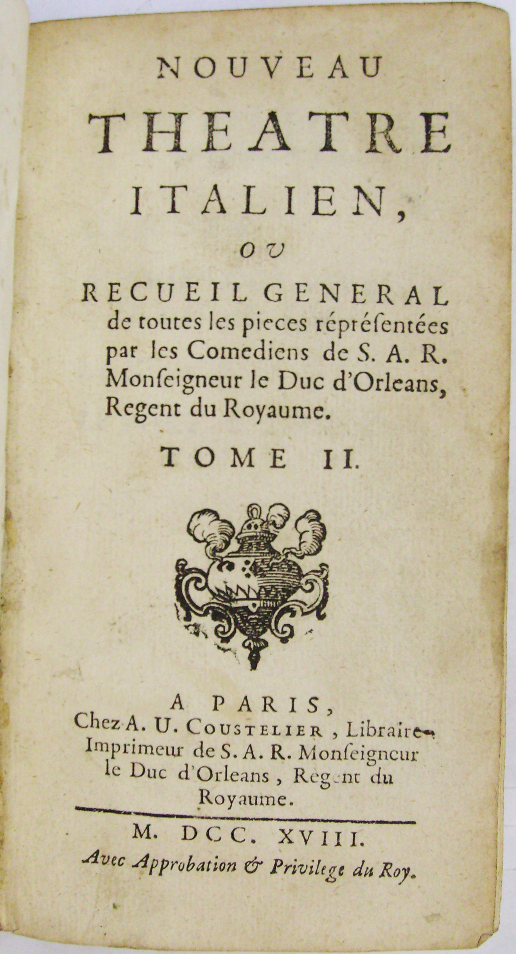 Nouveau Théatre Italien par Riccoboni chez A.U. Coustelier en 1718 tome 2